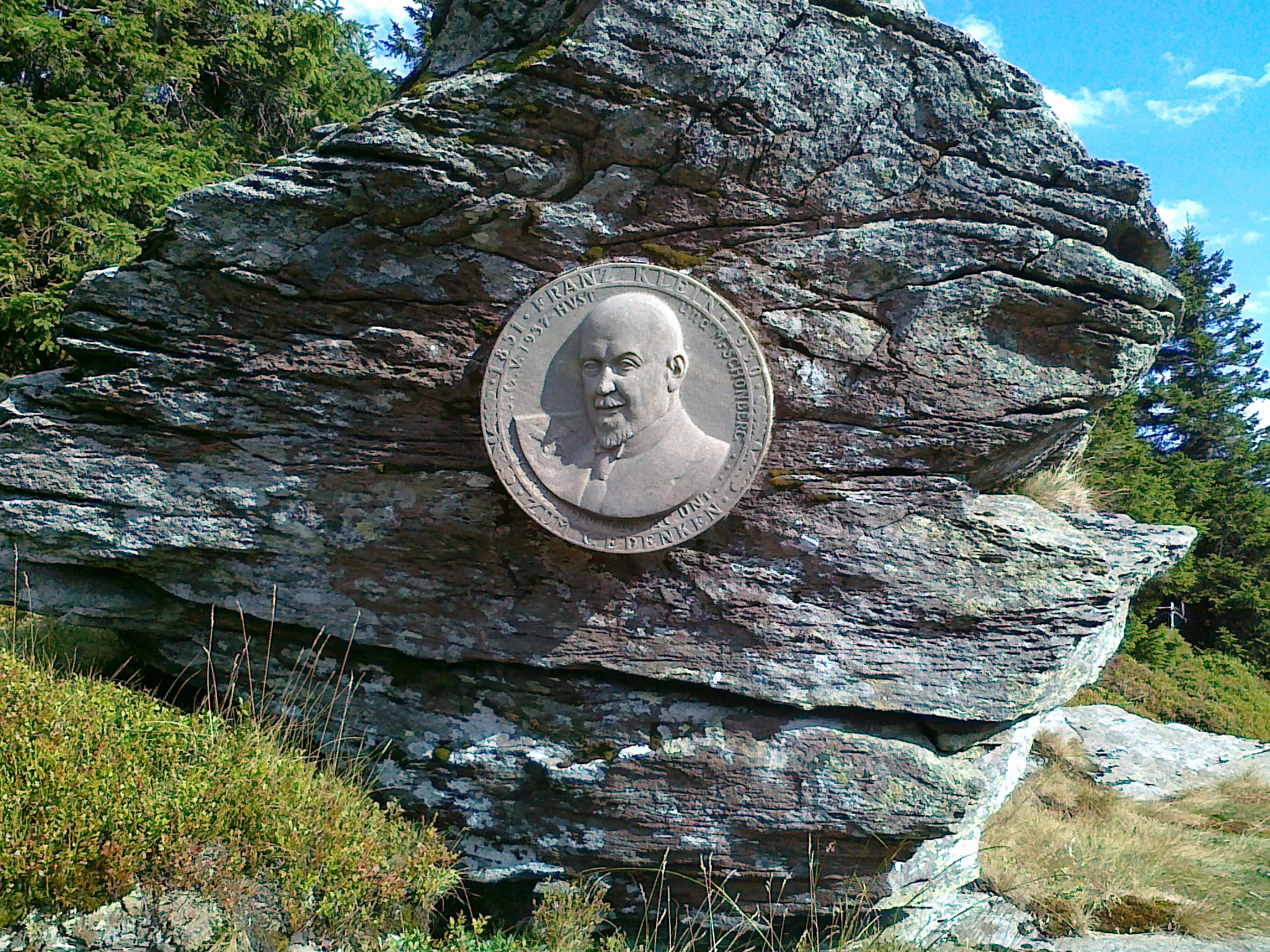 Skalisko z płaskorzeźbą Franza Kleina blisko zielonego szlaku turystycznego